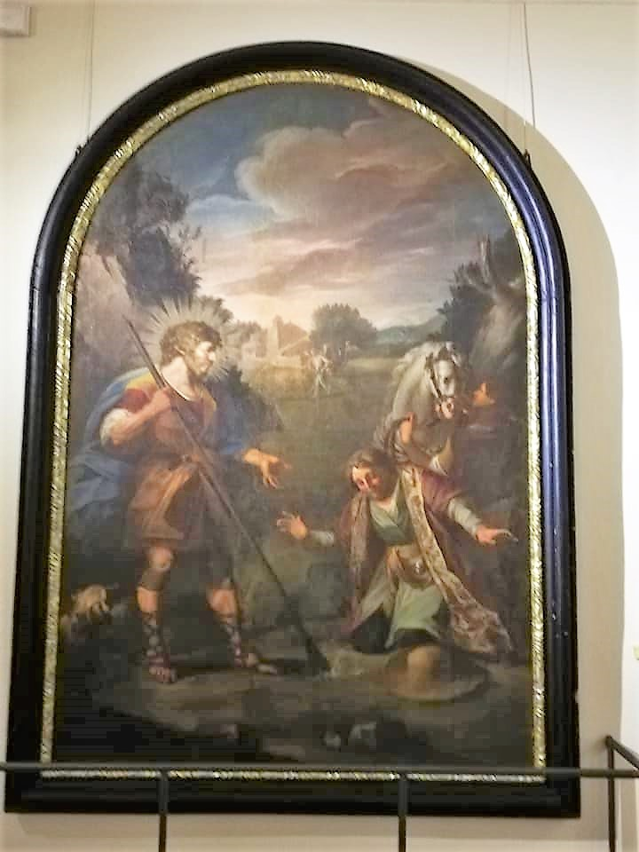 Sant'Isidoro Agricola che fa scaturire l'acqua, olio su tela di Matteo Desiderato, opera proveniente dalla chiesa di Santa Maria della Palma.